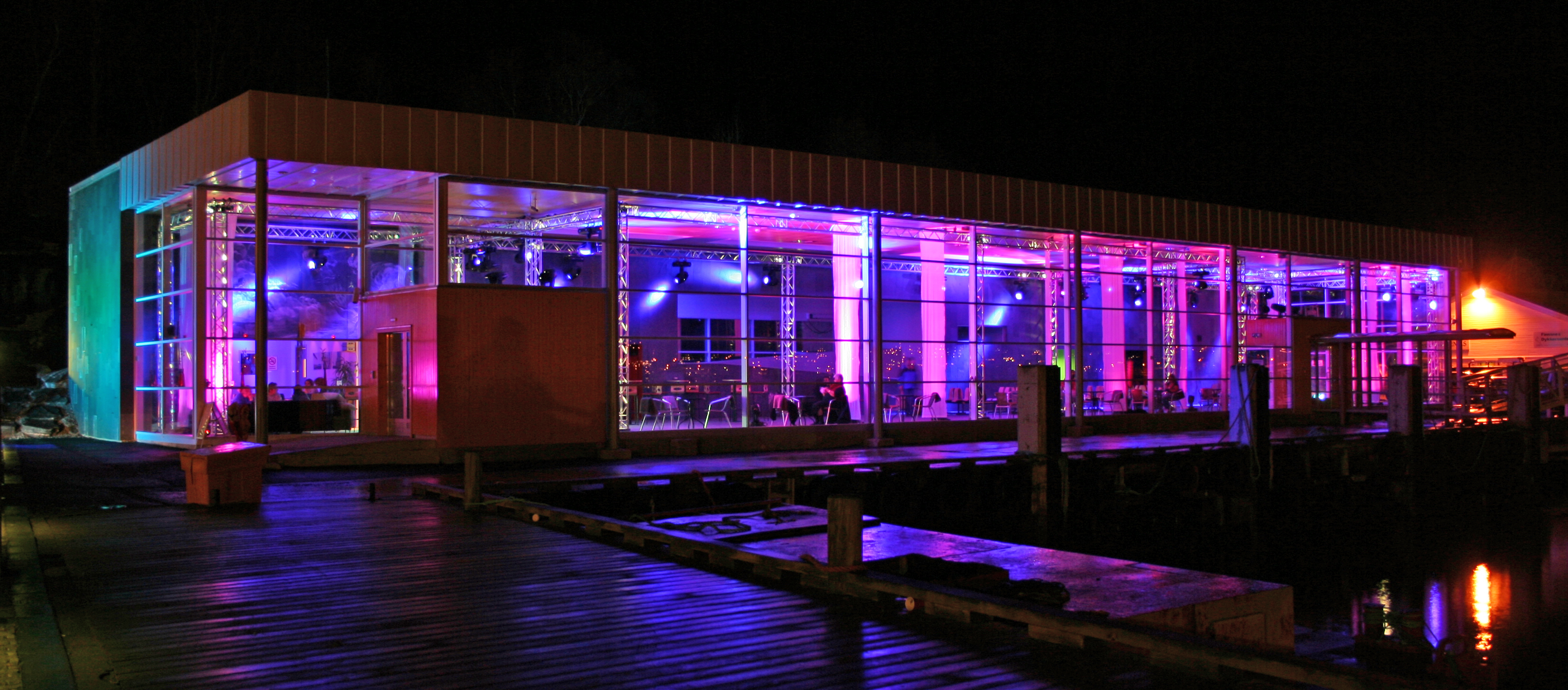 Finnsnes trafikkterminal, Finnsnes